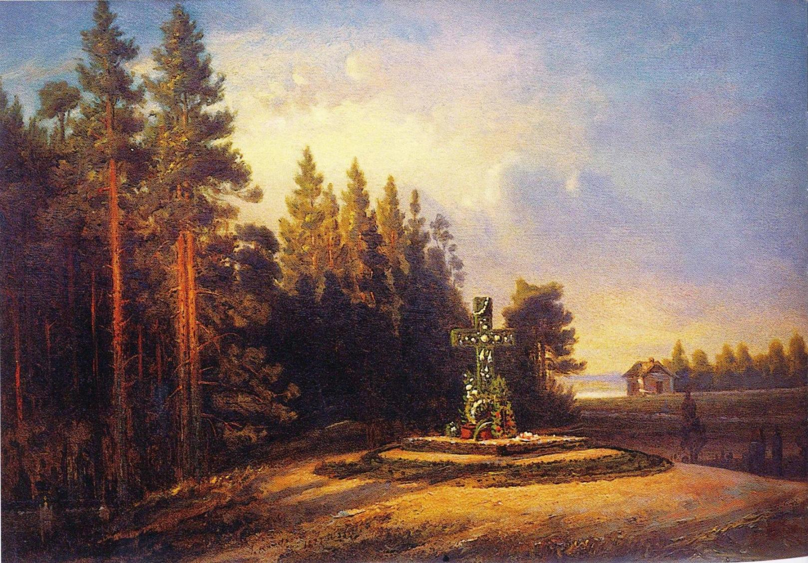 Johan Knutsonin maalaus J. L. Runebergin hautakummusta Porvoon Näsinmäen hautausmaalla ennen nykyisen hautamuistomerkin valmistumista. Maalaus on tehty pian hautajaisten jälkeen.